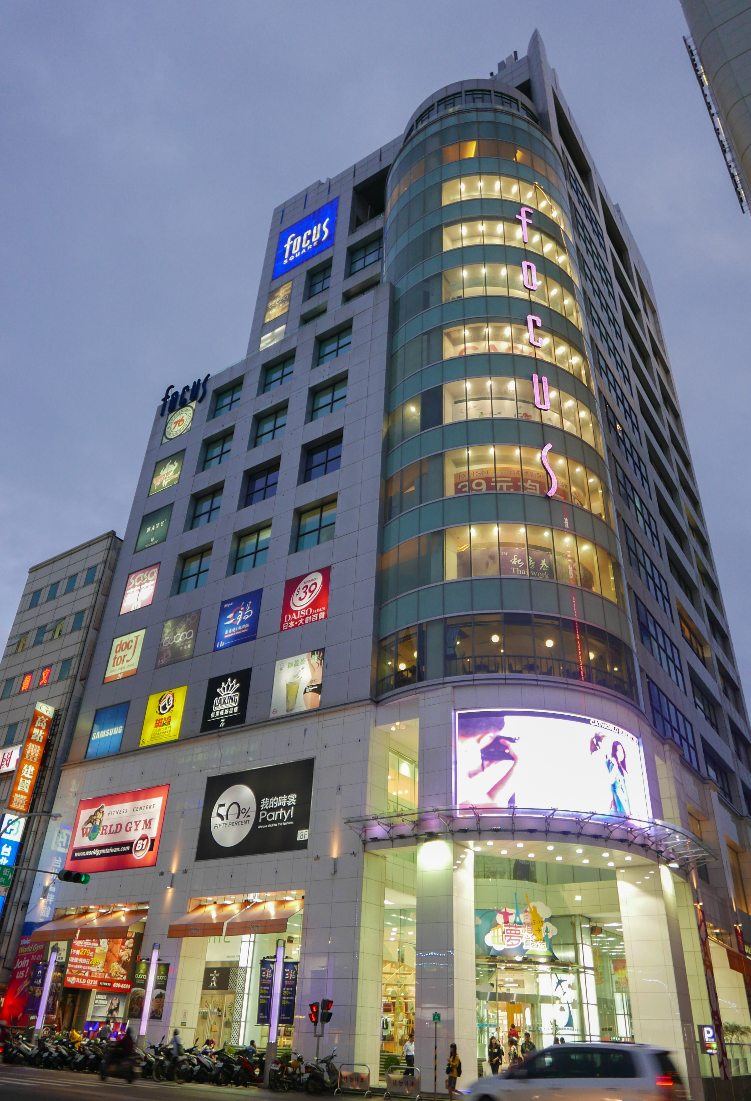 FOCUS時尚流行館（FOCUS SQUARE） （フォーカス スクエア、台湾・台南市）